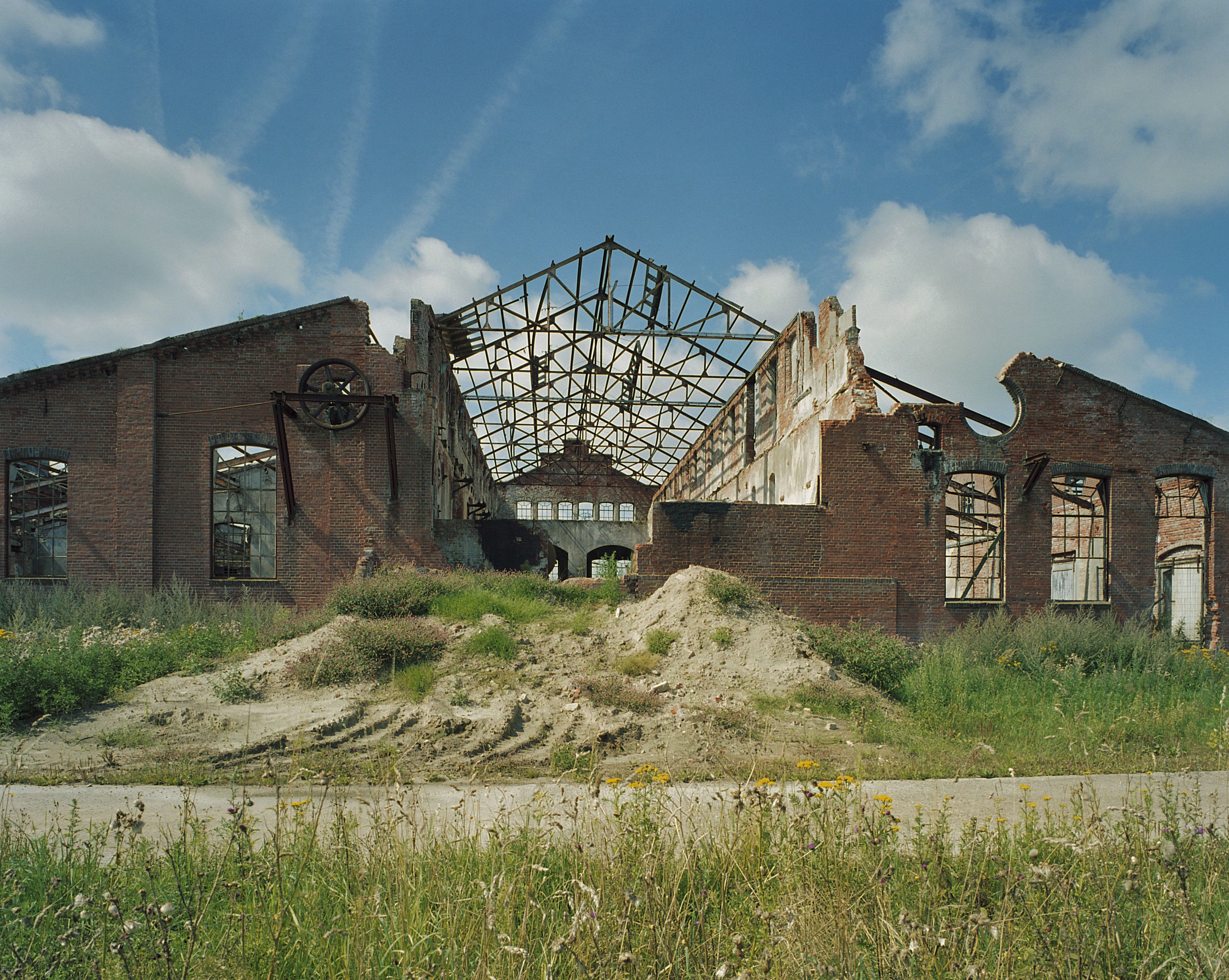 Strokartonfabriek De Toekomst: Overzicht grote hal, met reeds ingestrotte daken, vanaf afstand gezien